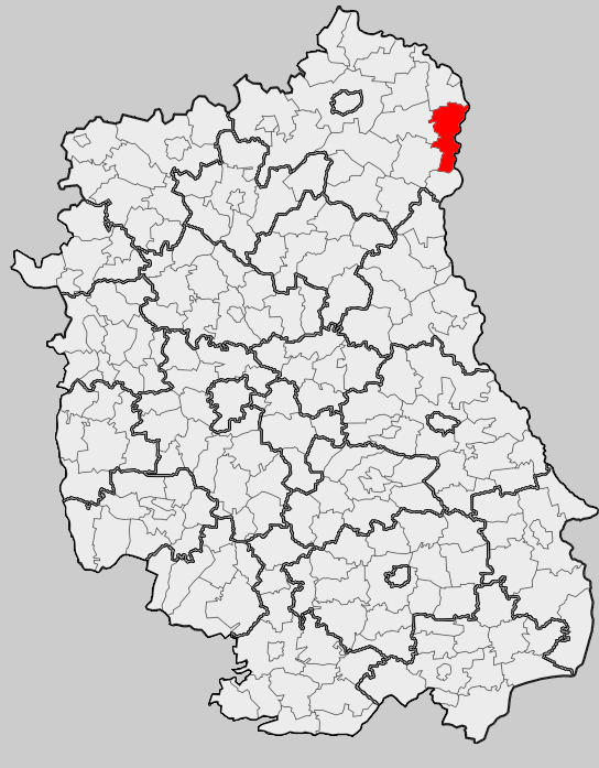 Map of gmina Kodeń, Biała Podlaska county, Lublin voivodship Mapa gminy Kodeń, powiat bialski, województwo lubelskie